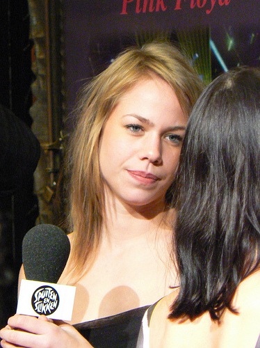 Nicolette Kluiver bij de première van de Nederlandse film 'Alibi' bij Pathé Tuschinski in Amsterdam.